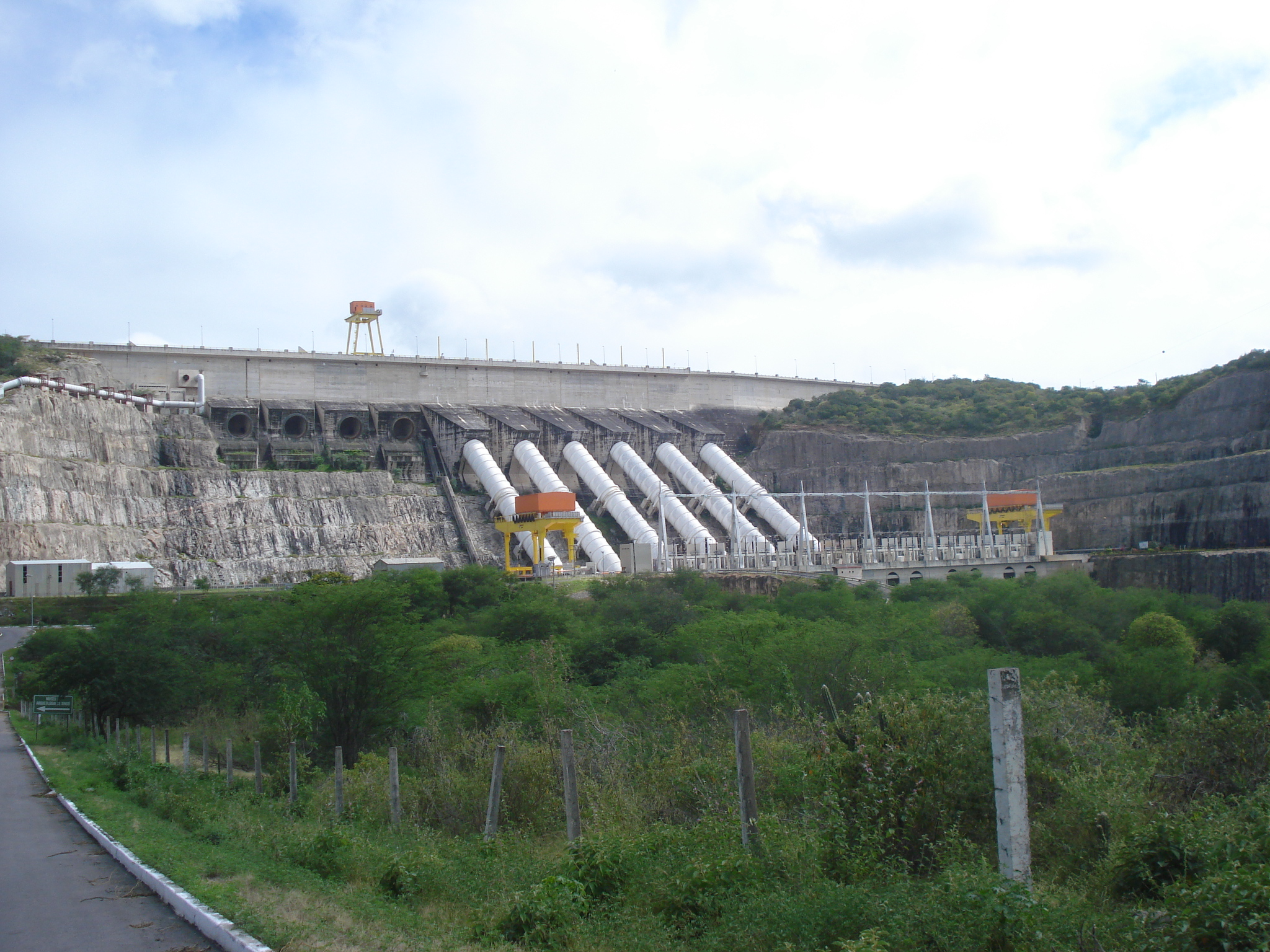 Usina de Xingó, no rio São Francisco, Brasil